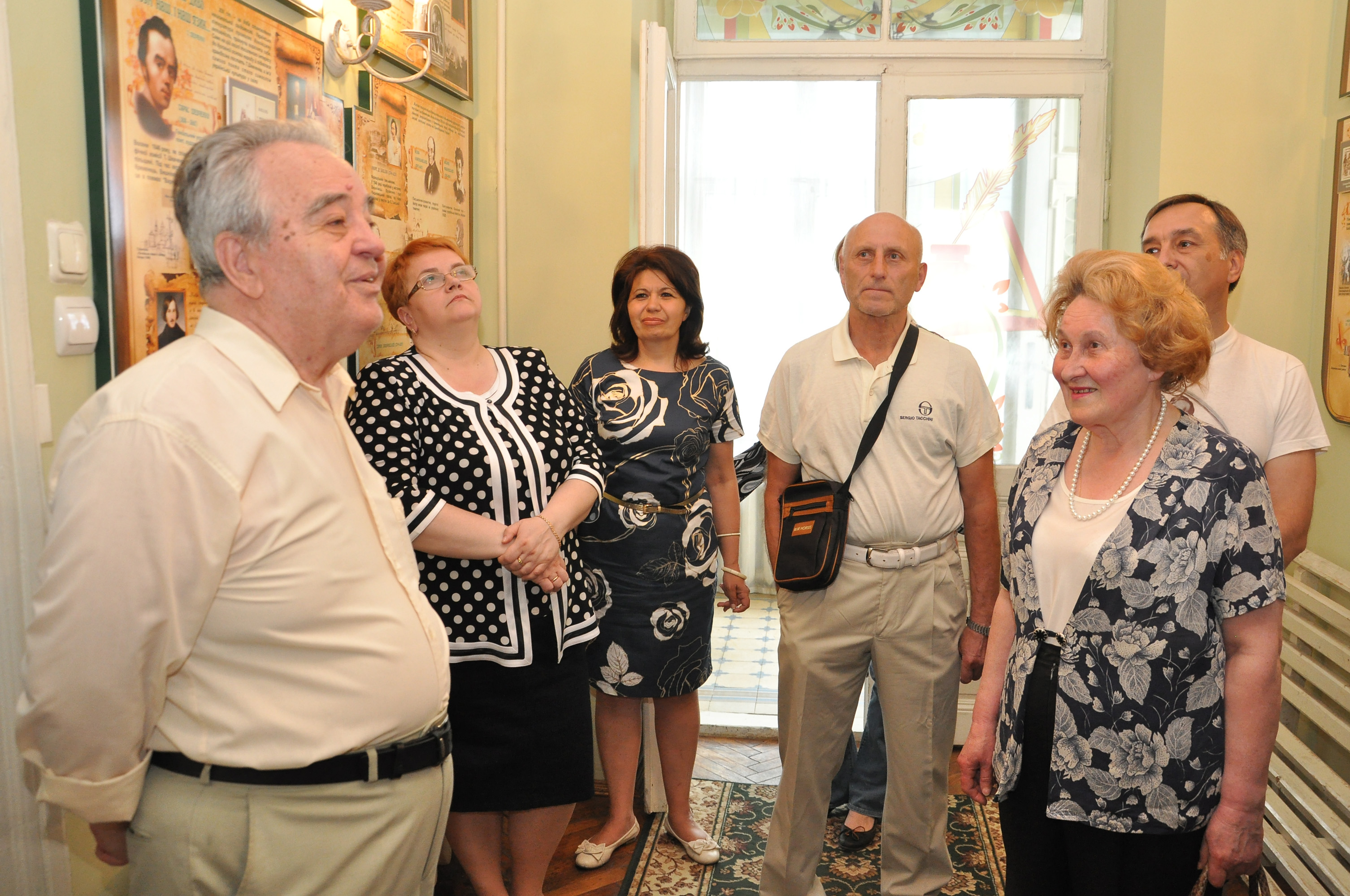 Український письменник, дослідник історії, автор бестселерів «Країна Моксель, або Московія», «Москва Ординська» та «Україна-Русь» Володимир Броніславович Білінський (крайній зліва) в бібліотеці-музеї] «Літературне Тернопілля» (2015 р.). Поряд (зліва направо): бібліотекар Оксана Лехіцька, директор бібліотеки-музею «Літературне Тернопілля» Галина Компанієць, невідомий, лікар, громадська діячка, просвітянка Дарія Чубата, невідомий.